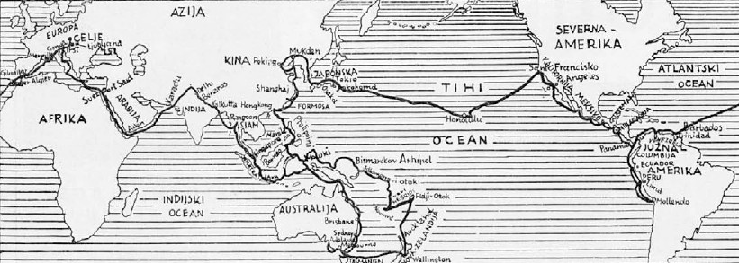 Potovanje Alme Karlin